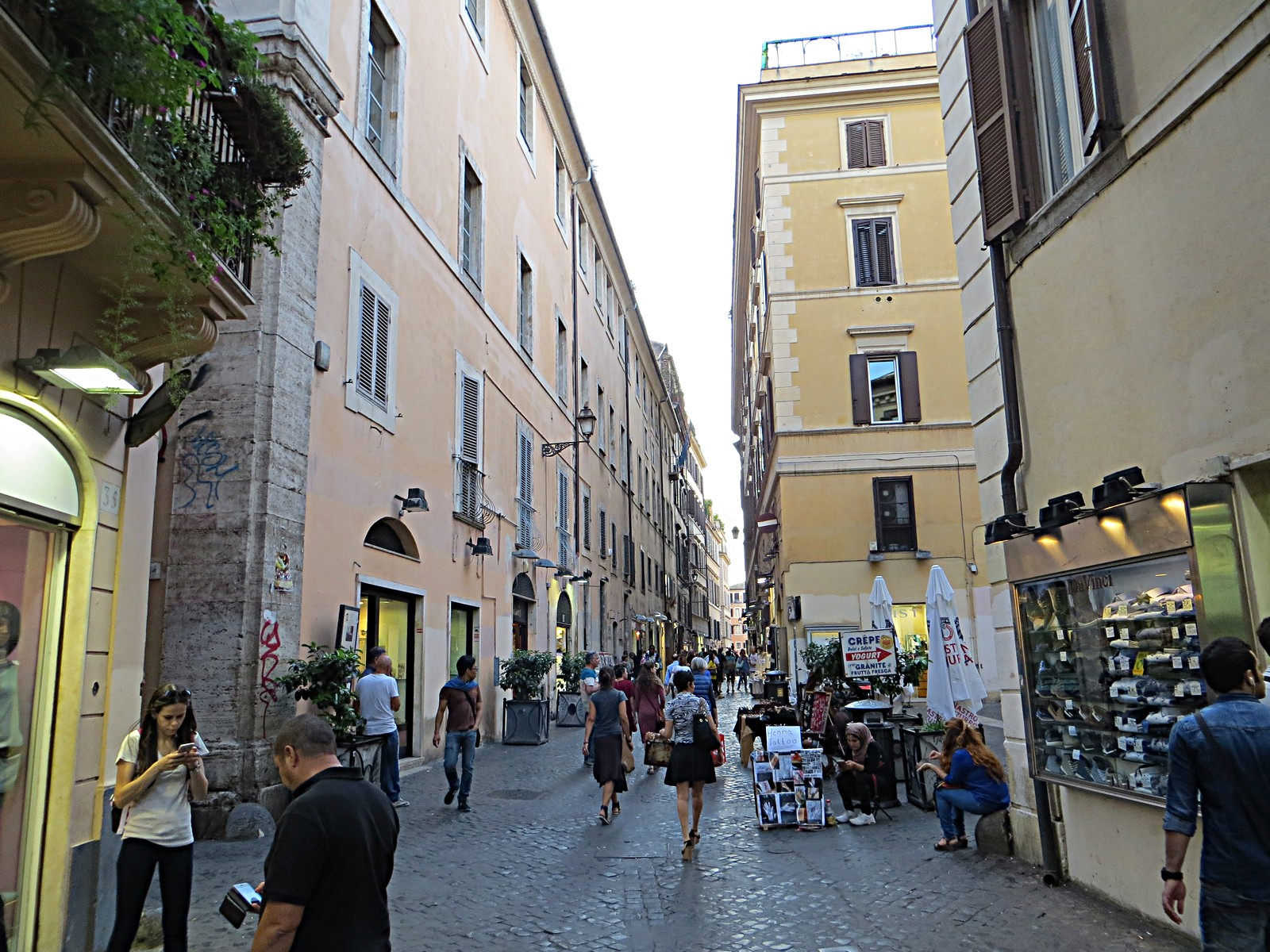 Via dei Giubbonari